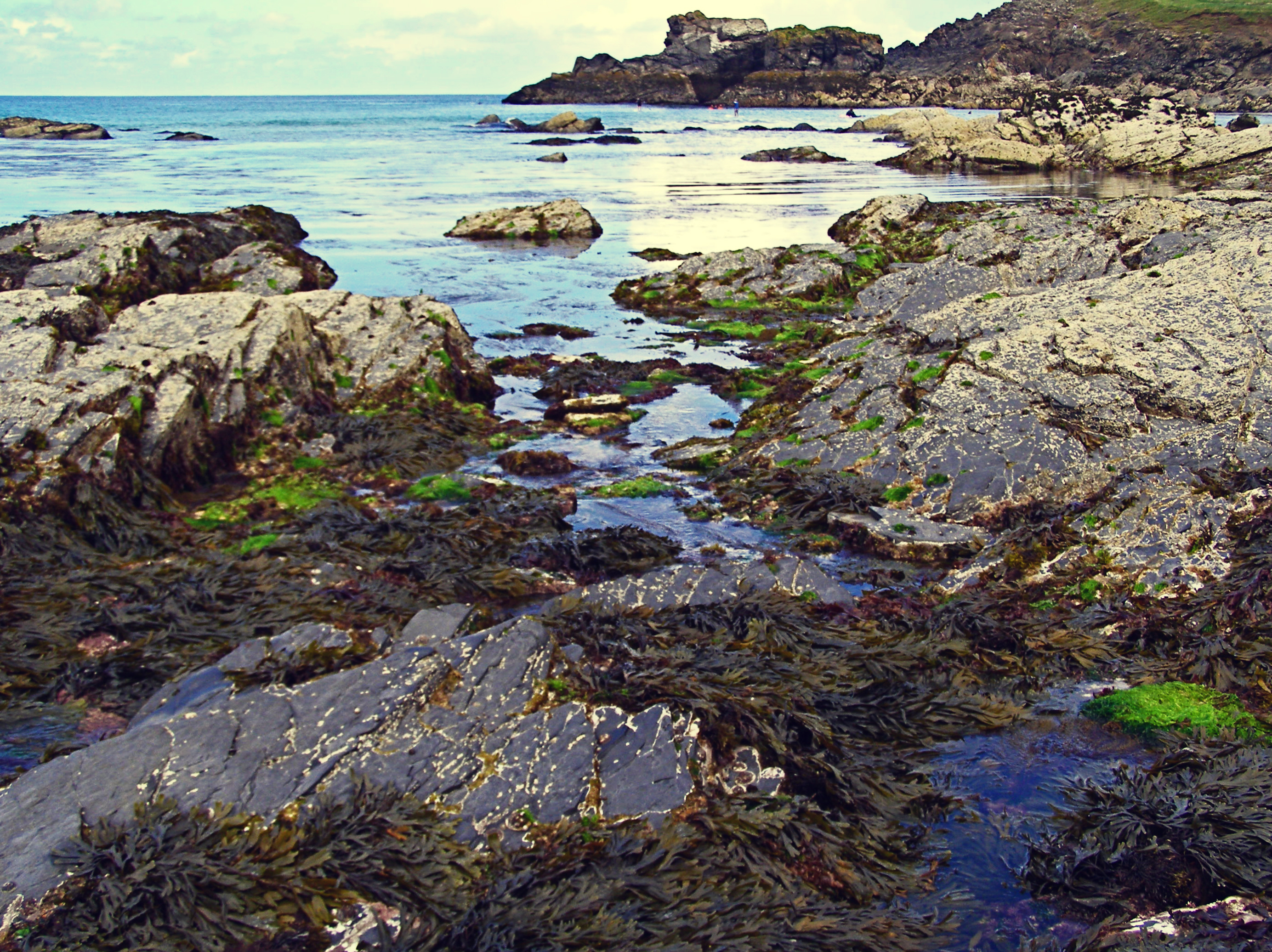 Trevone Bay